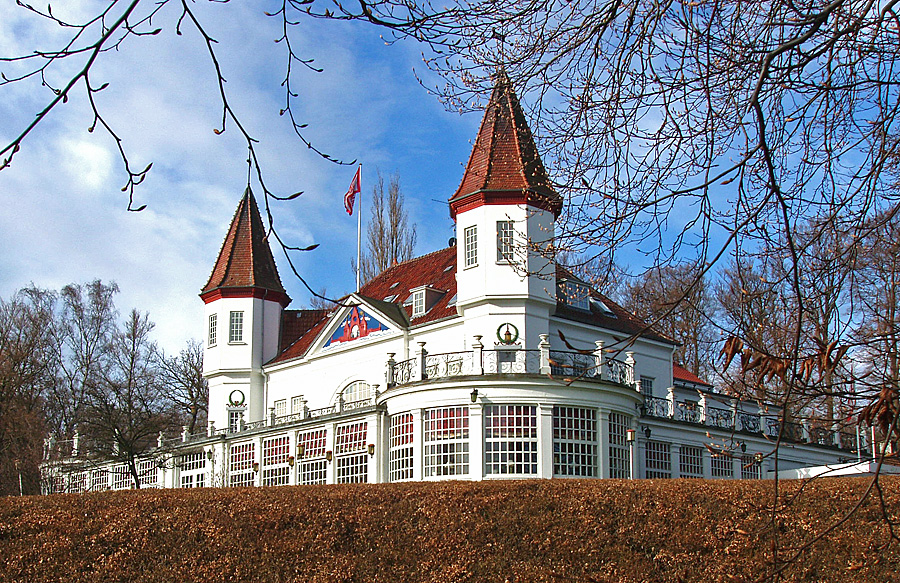 Varna Palæet er en skovrestaurant i Marselisborg Skov syd for Århus. Den er er opført 1908-1909 i forbindelse med Landsudstillingen i Århus i 1909. Den er tegnet af arkitekten Eggert C. Achen (1853-1913).